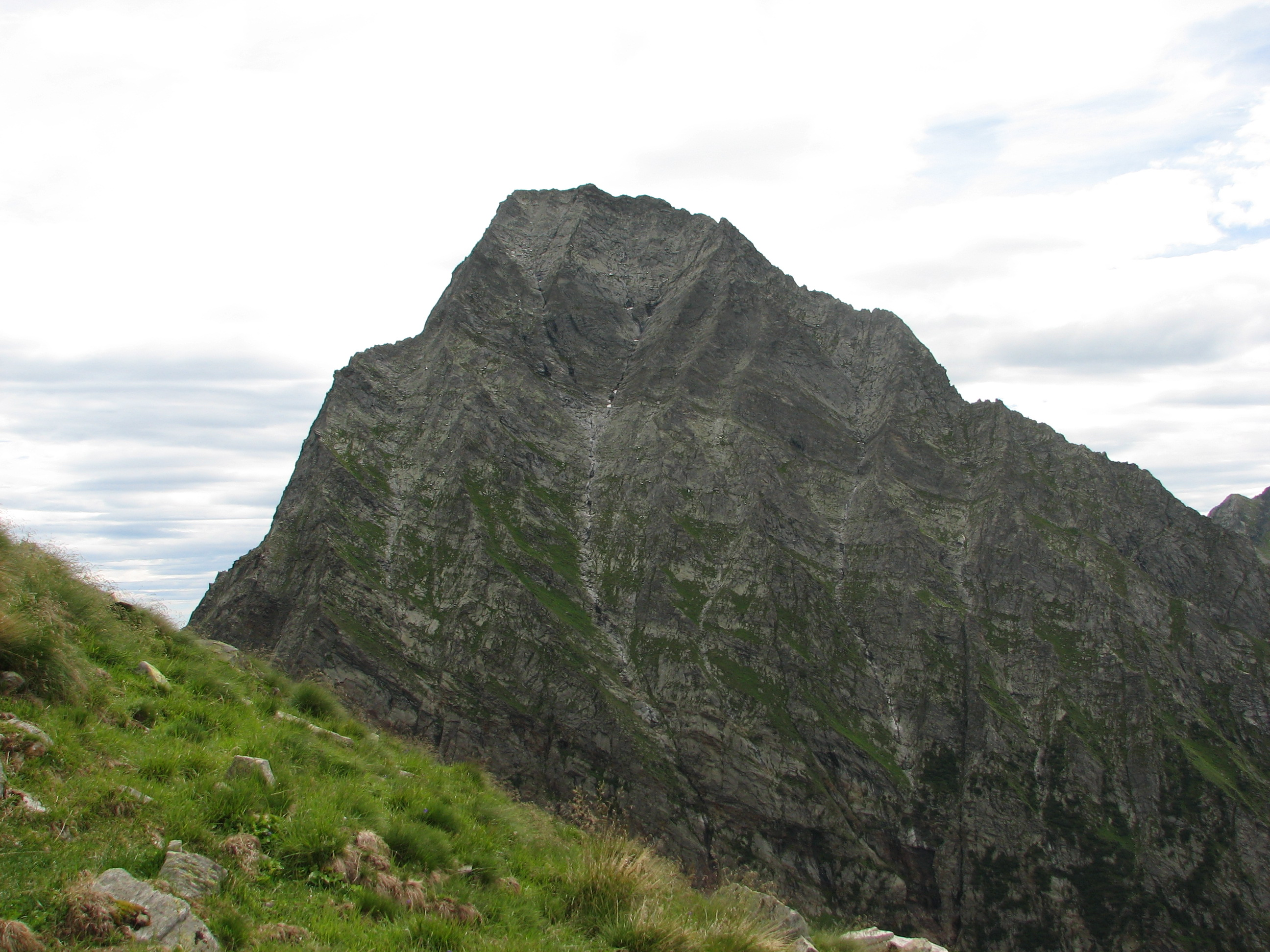 Monte Tagliaferro (2964 m) Valsesia, Prov di vercelli (Italia)